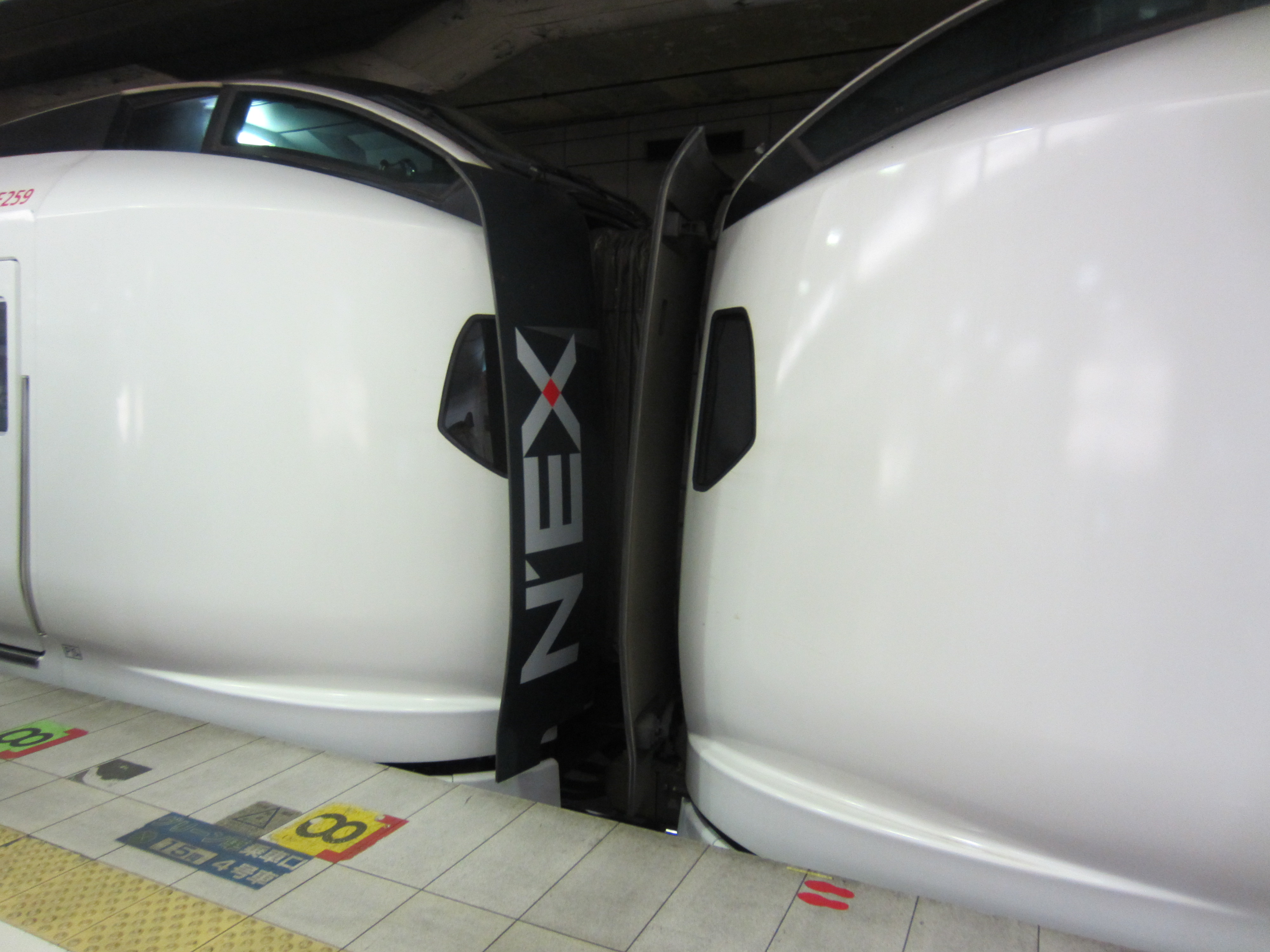 成田エクスプレス連結部分